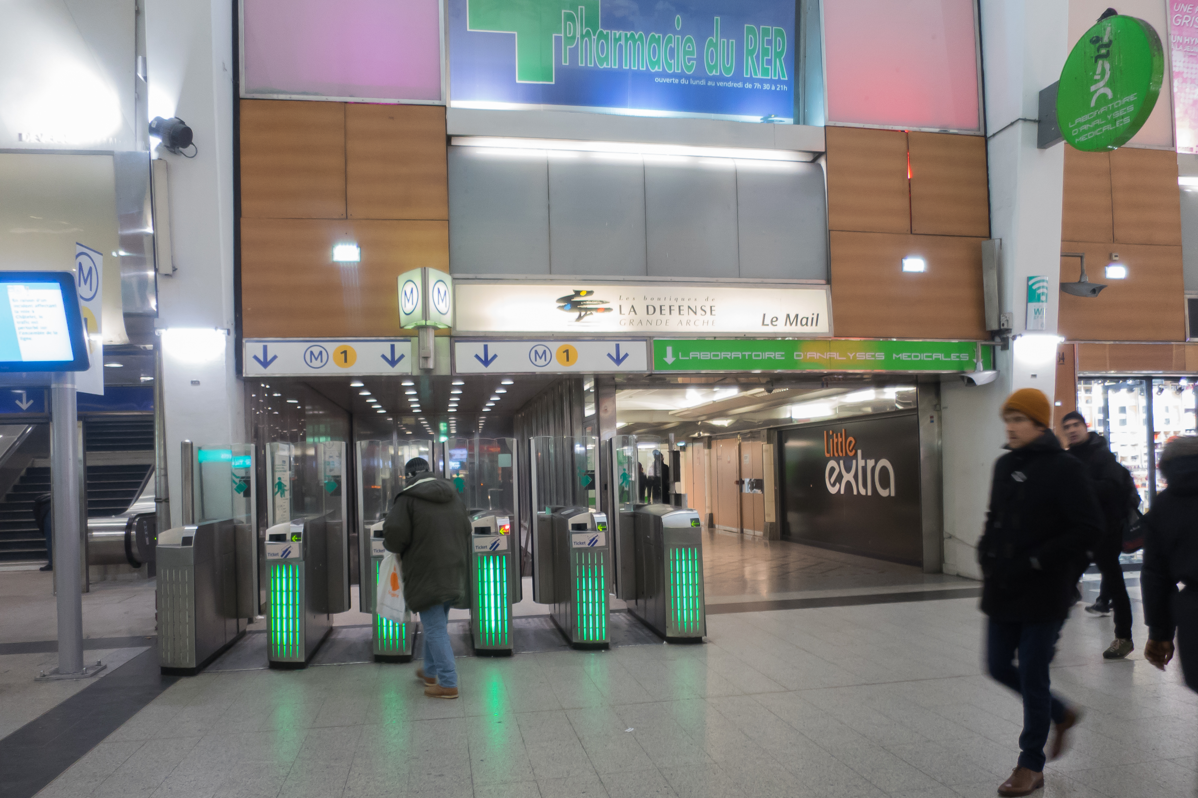 Vue de la station "La Défense" de la ligne 1 du métro de Paris / Puteaux / Hauts-de-Seine / France